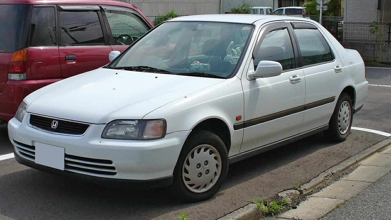 初代ホンダ・ドマーニ